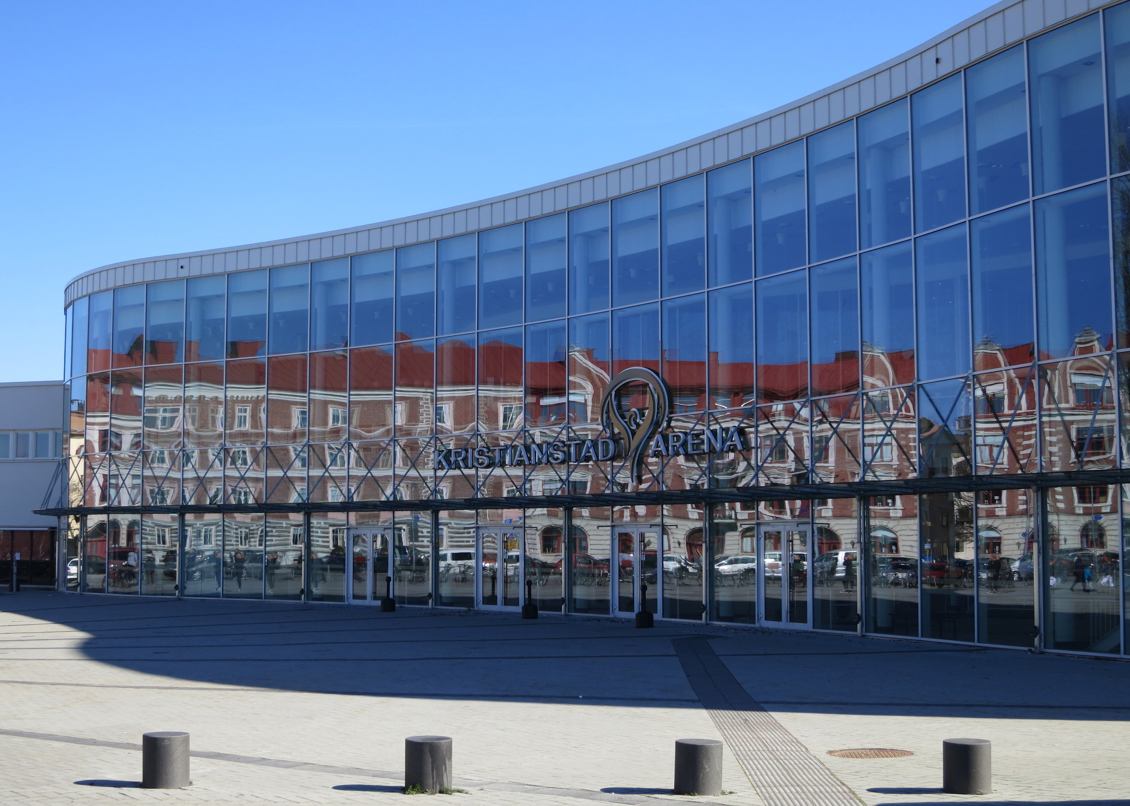 Kristianstad Arena, speglingar